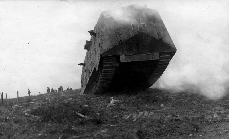 Deutscher Sturmpanzerwagen A.7.V., 1917- 1918